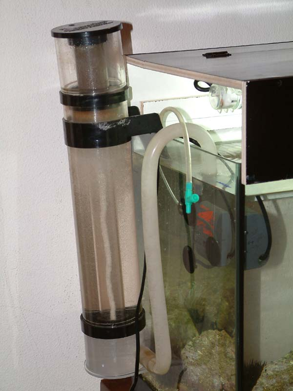 schiumatoio